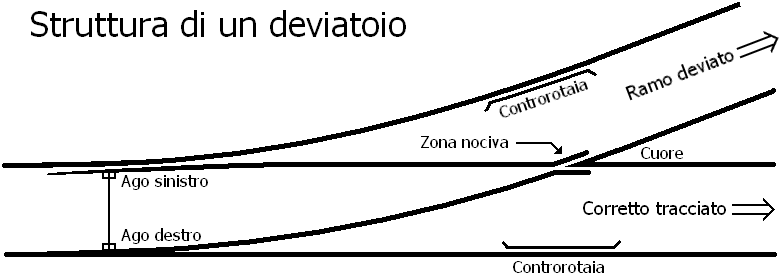 Struttura di un deviatoio con le nomenclature principali. (Disegno eseguito da me)